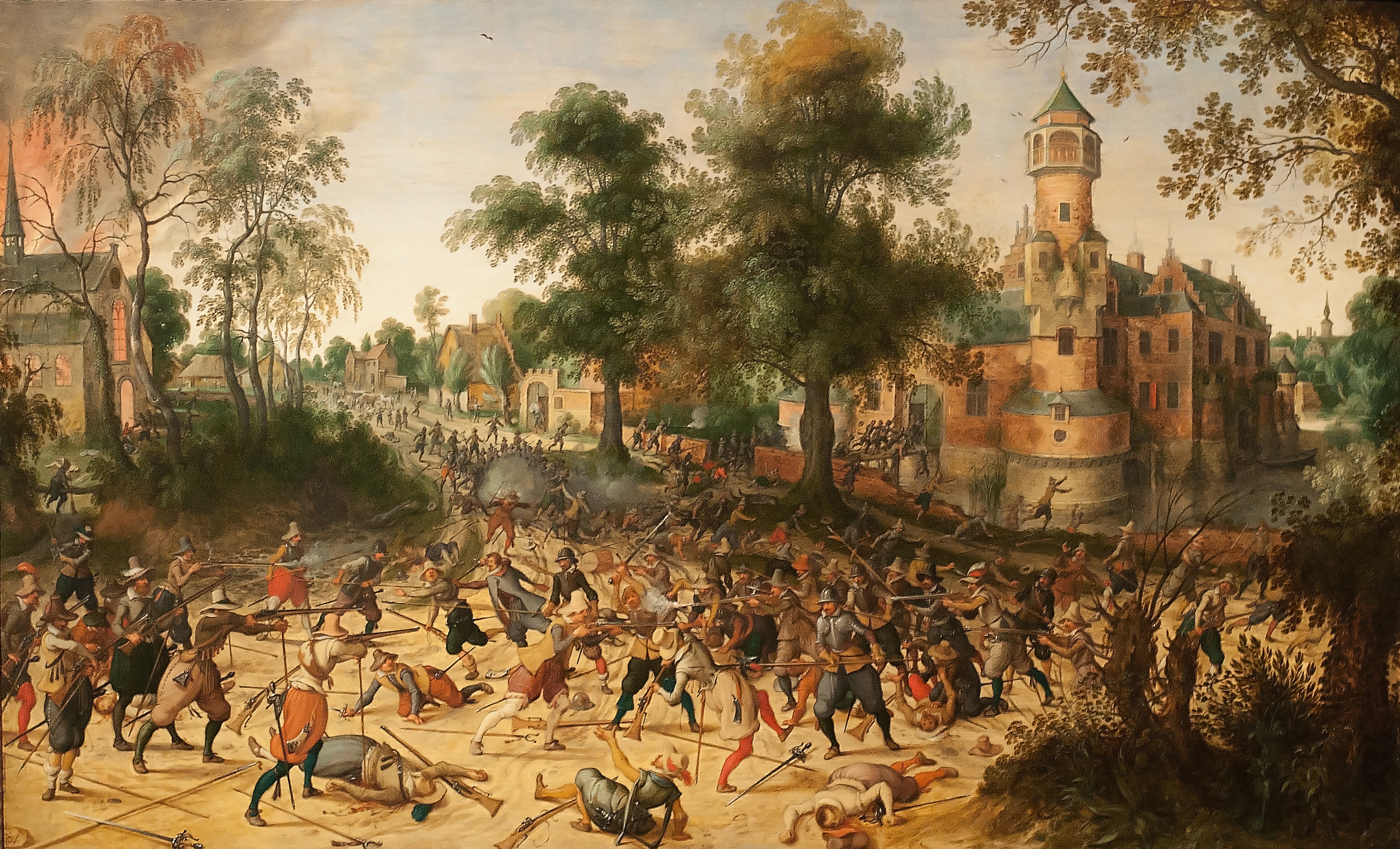 Sebastiaen Vrancx, 1573-1647, Flamländsk, olja. Inköpt 1952. This is a photo of an artwork at the Gothenburg Museum of Art in Sweden with the identifier: GKM 1396